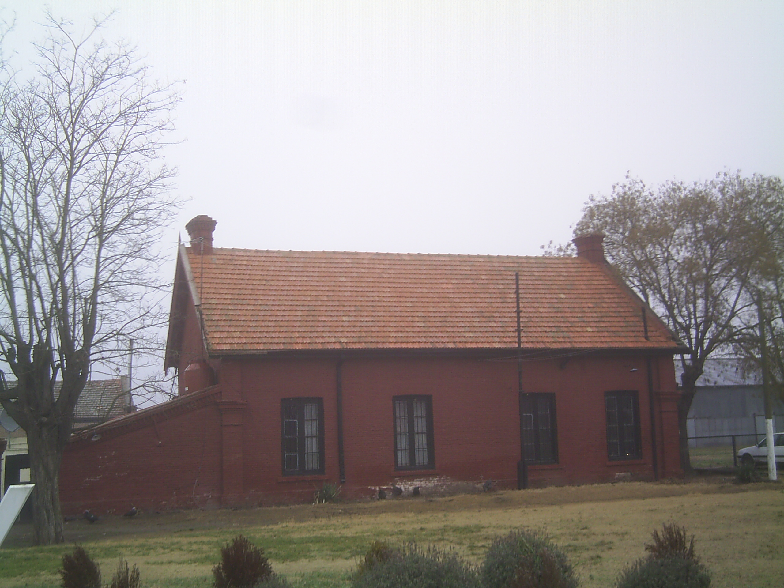 Estacion de trenes de Gardey